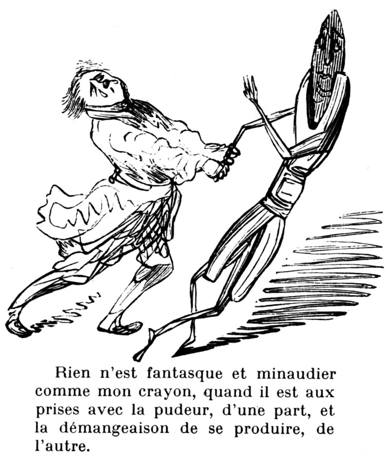 Le crayon de Gustave Doré, illustration de Histoire de la Sainte Russie (1854)